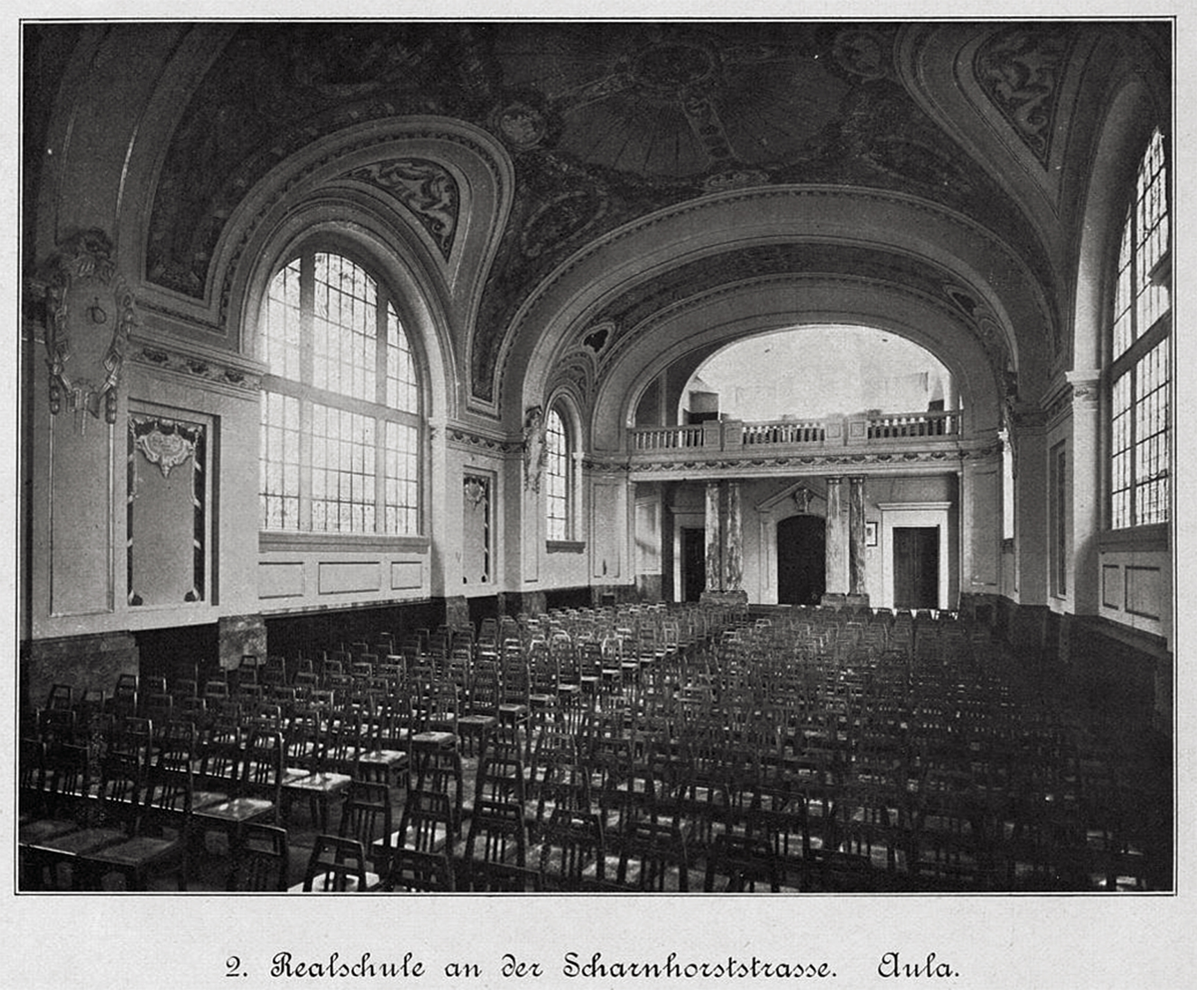 Realschule an der Scharnhorststraße (Leibniz-Gymnasium), Aula, Foto von 1907